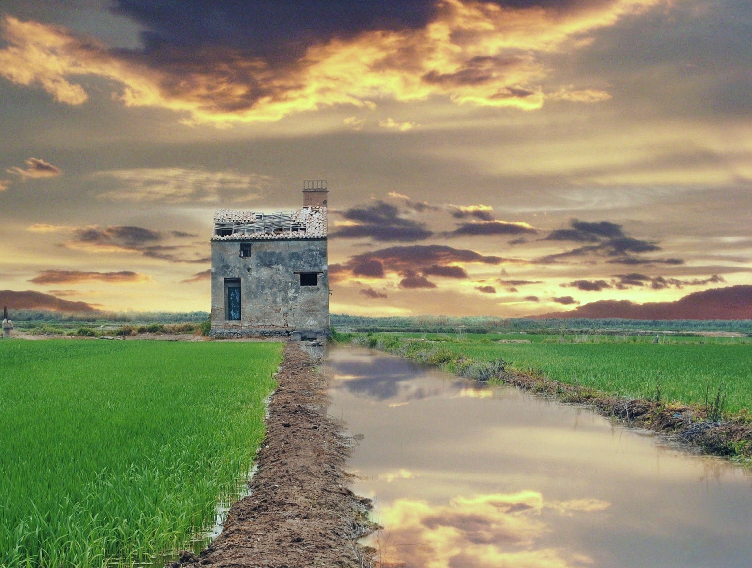 Casa de campo utilizada para guardar las herramientas de trabajo